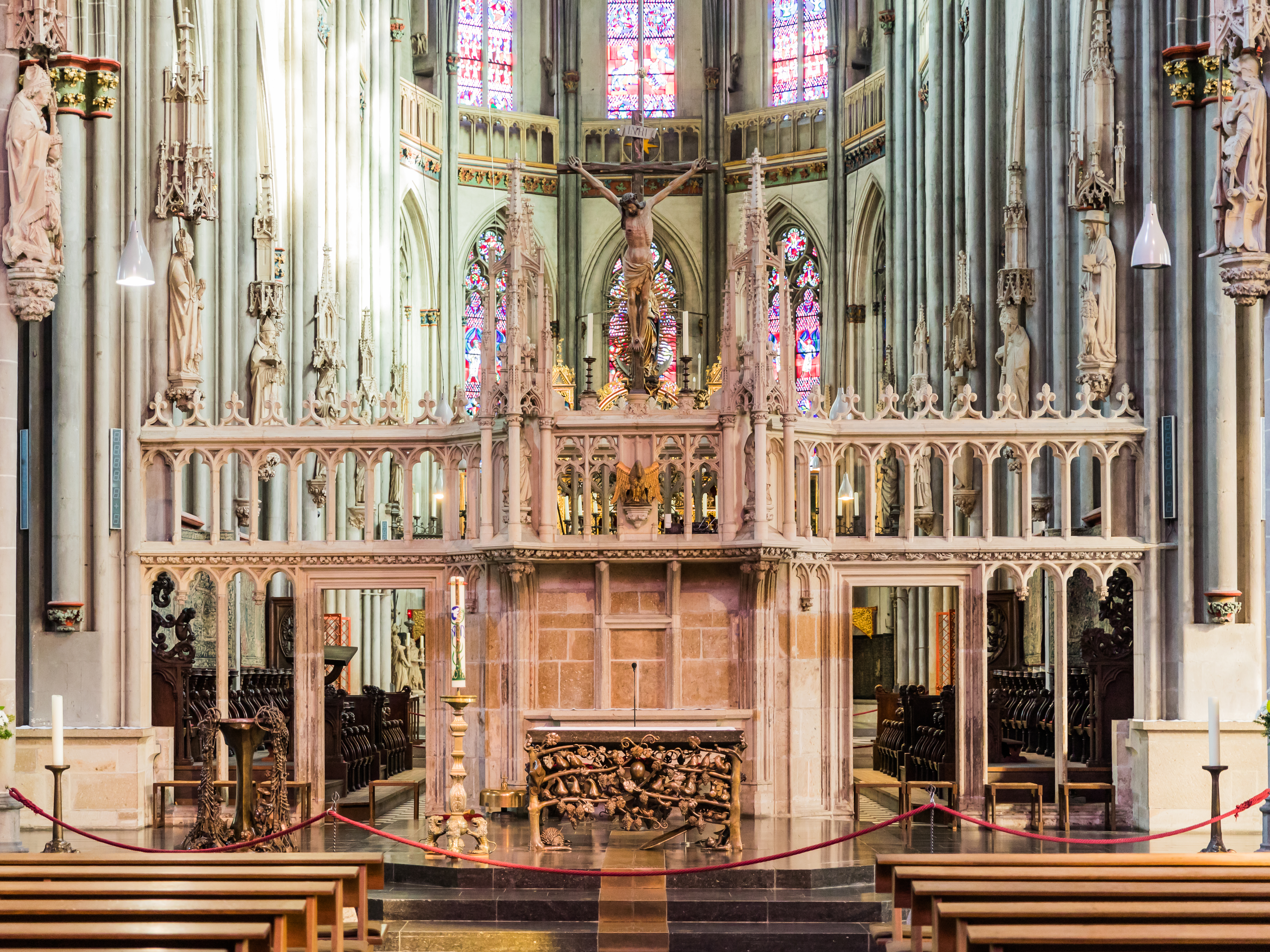 Xantener Dom, Hauptschiff Richtung Chor